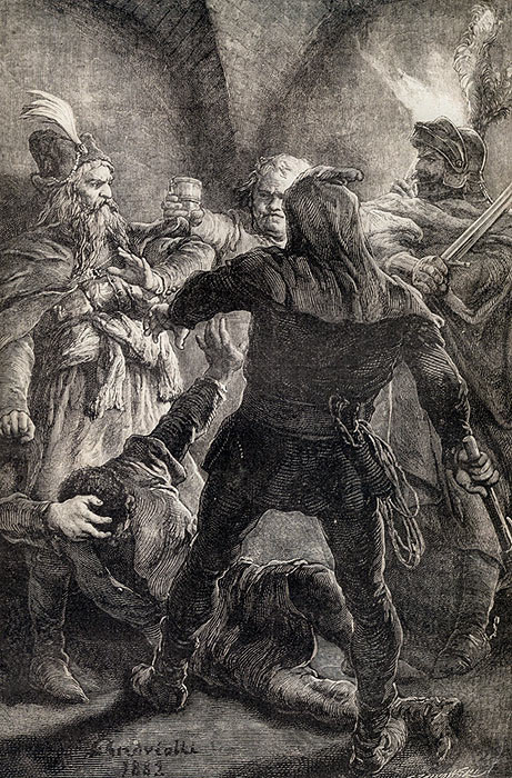 Беларуская (тарашкевіца): Забойства Кейстута (Kiejstut)